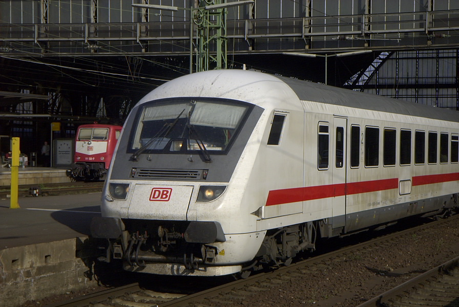 DB Steuerwagen (Bpmbdzf) an der Spitze eines InterCity in Richtung Norddeich Mole im Hauptbahnhof Bremen.